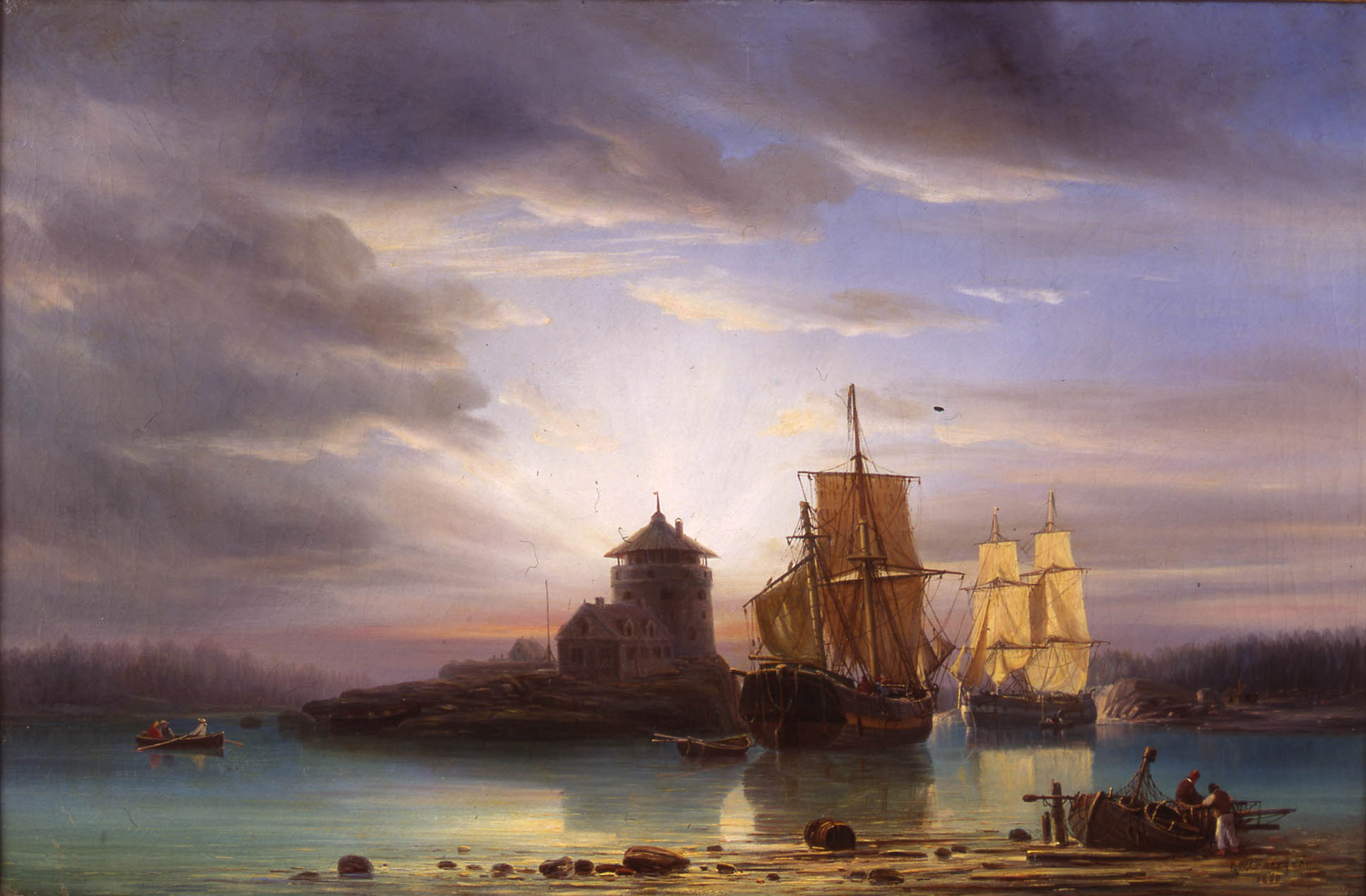 Två segelfartyg till ankars med löst hängande segel vid Dlarö skans. I förgrunden två män vid uppdragen roddbåt.